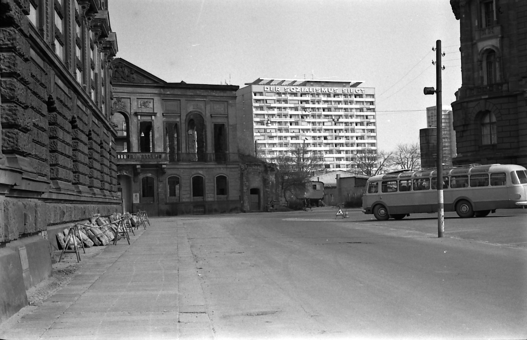 1969: Hochhaus Pirnaischer Platz mit dem Schriftzug "Der Sozialismus siegt", links der Bildmitte die Ruine des Kurländer Palais (Standort des Fotografen: Salzgasse)